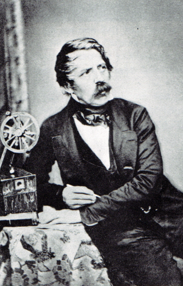 Carl August von Steinheil (* 12. August 1801; † 12. September 1870), deutscher Physiker